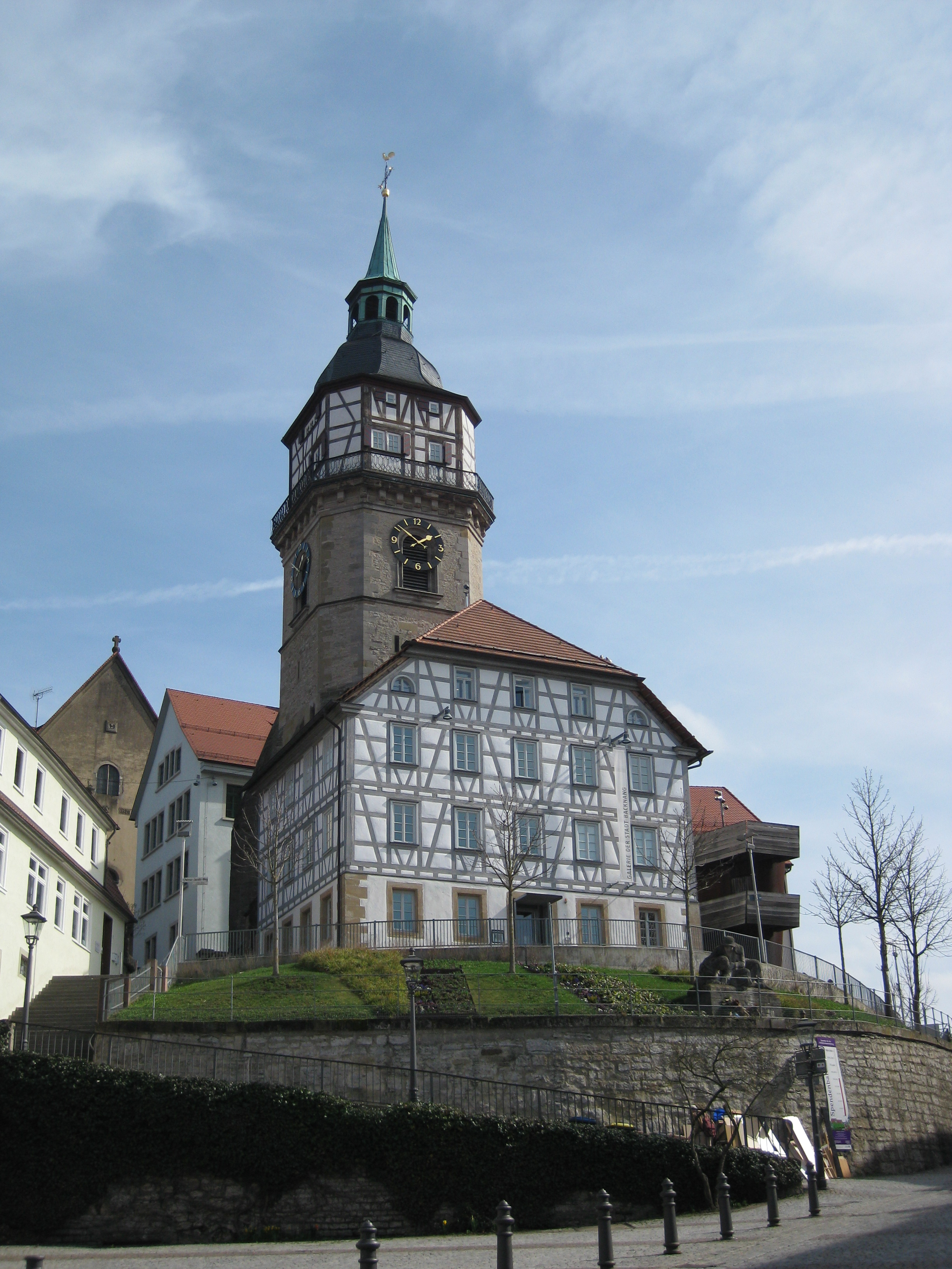 Backnang Turmschulhaus